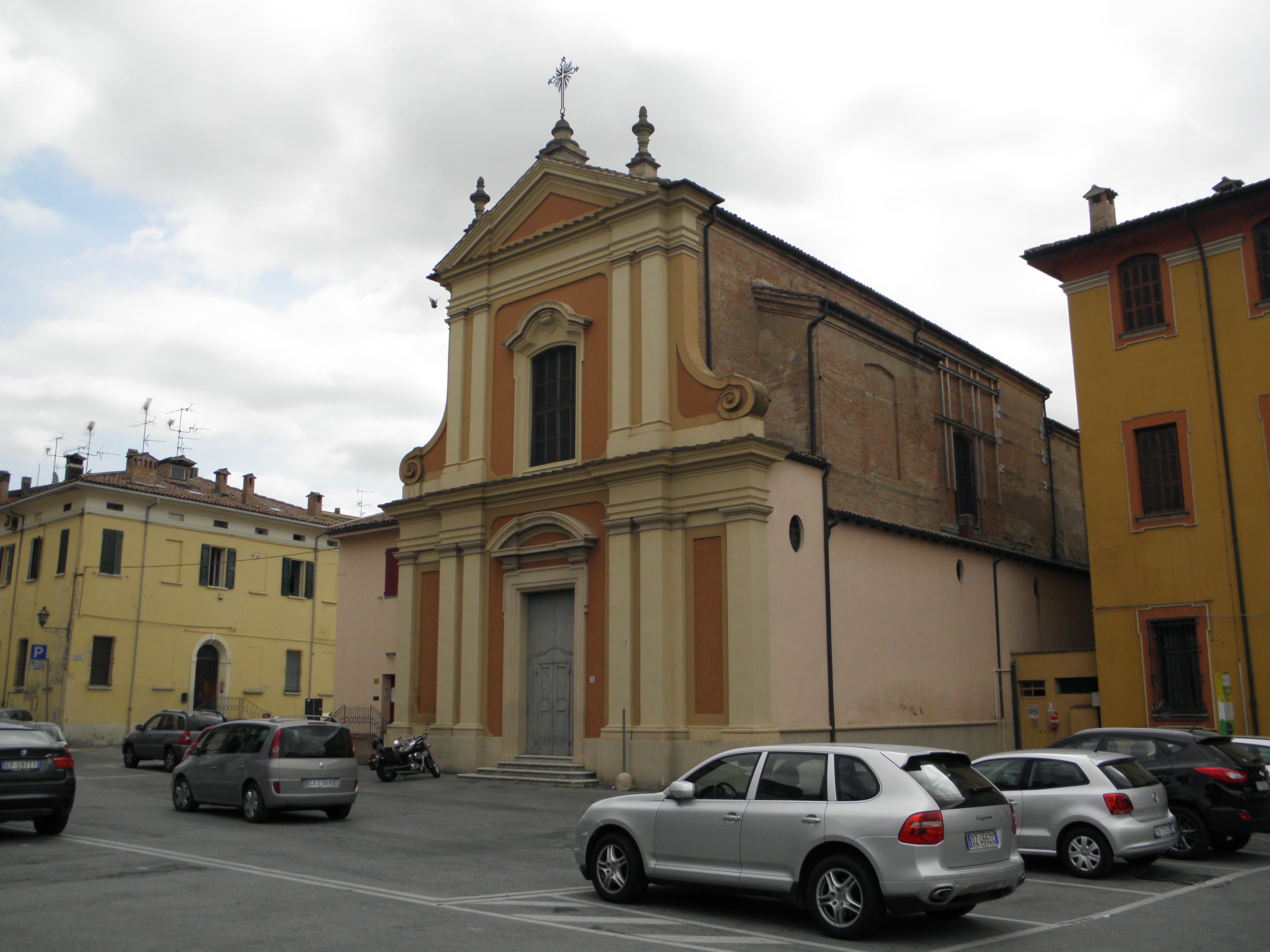 San Giovanni in Persiceto: la chiesa della Beata Vergine della Cintura.